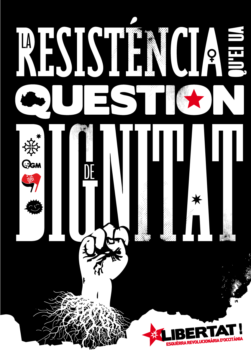 Afica LIBERTAT, version gascona : La Resisténcia qu'ei ua question de dignitat!